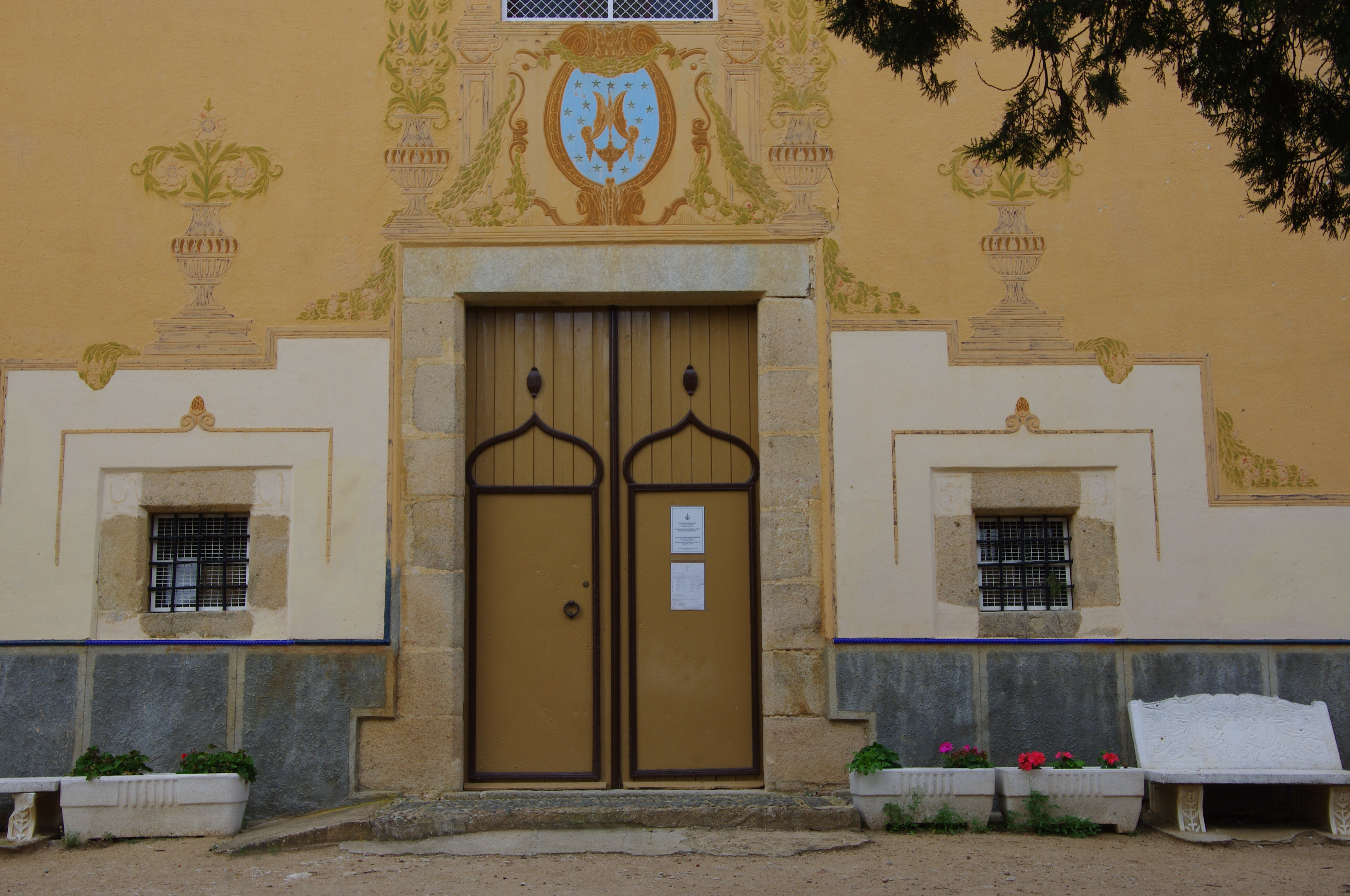 Ermita de Sant Quirze (Lloret de Mar)